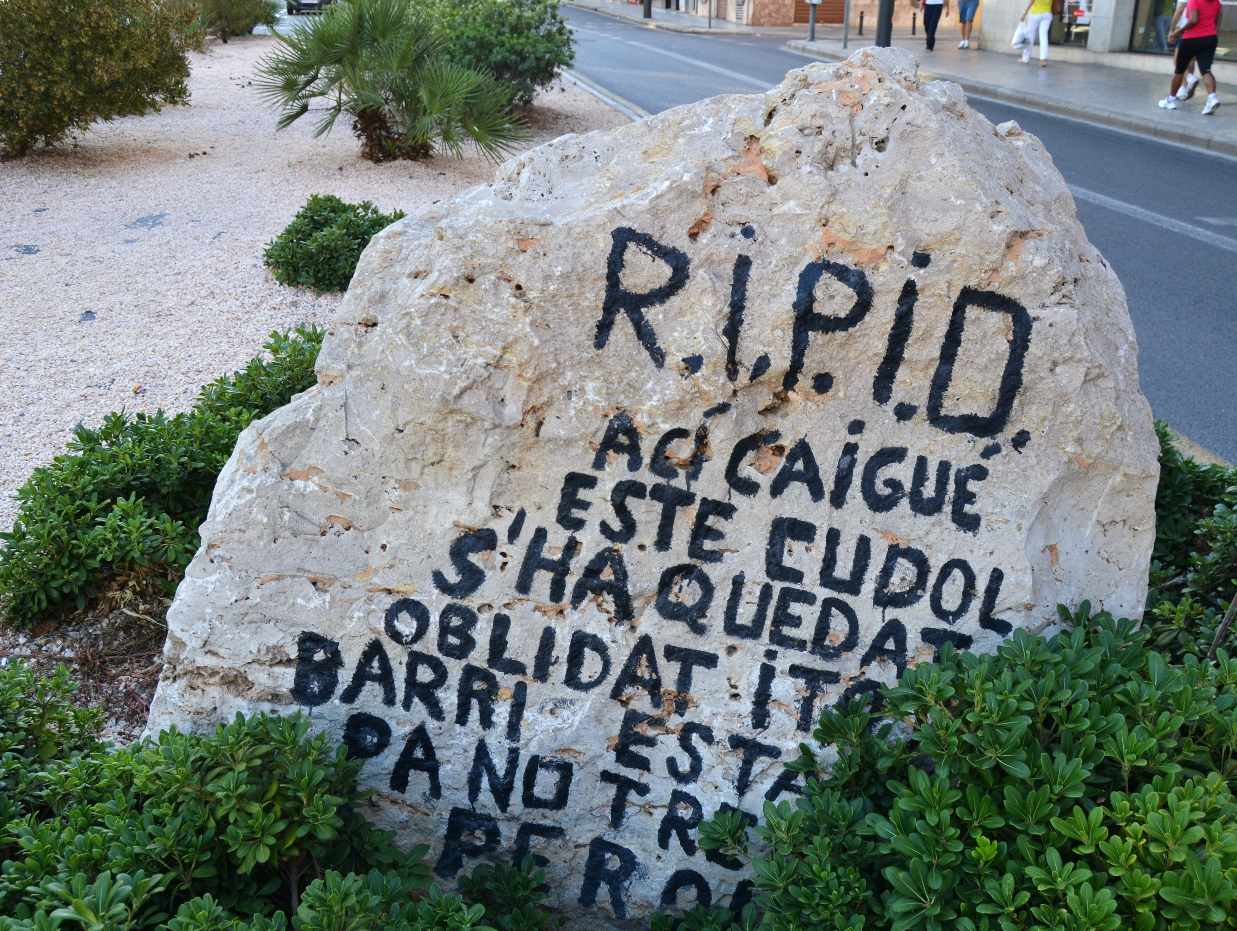 El Cudol, avinguda del Doctor Peset Aleixandre, València.